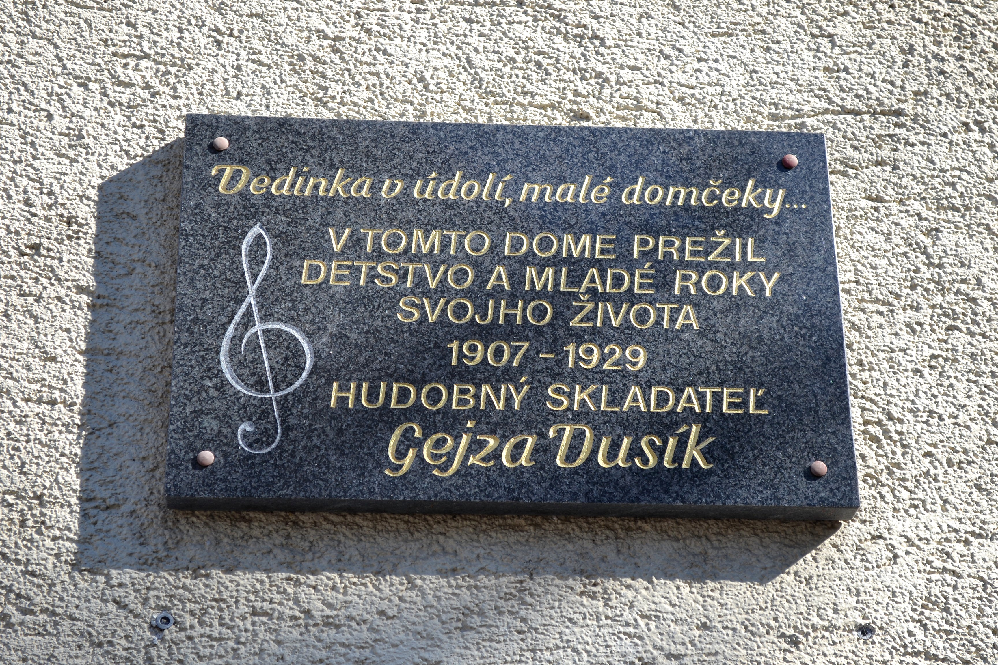 Križovany nad Dudváhom (okr. Trnava), dom, v ktorom prežil časť života hudobný skladateľ Gejza Dusík; pamätná tabuľa